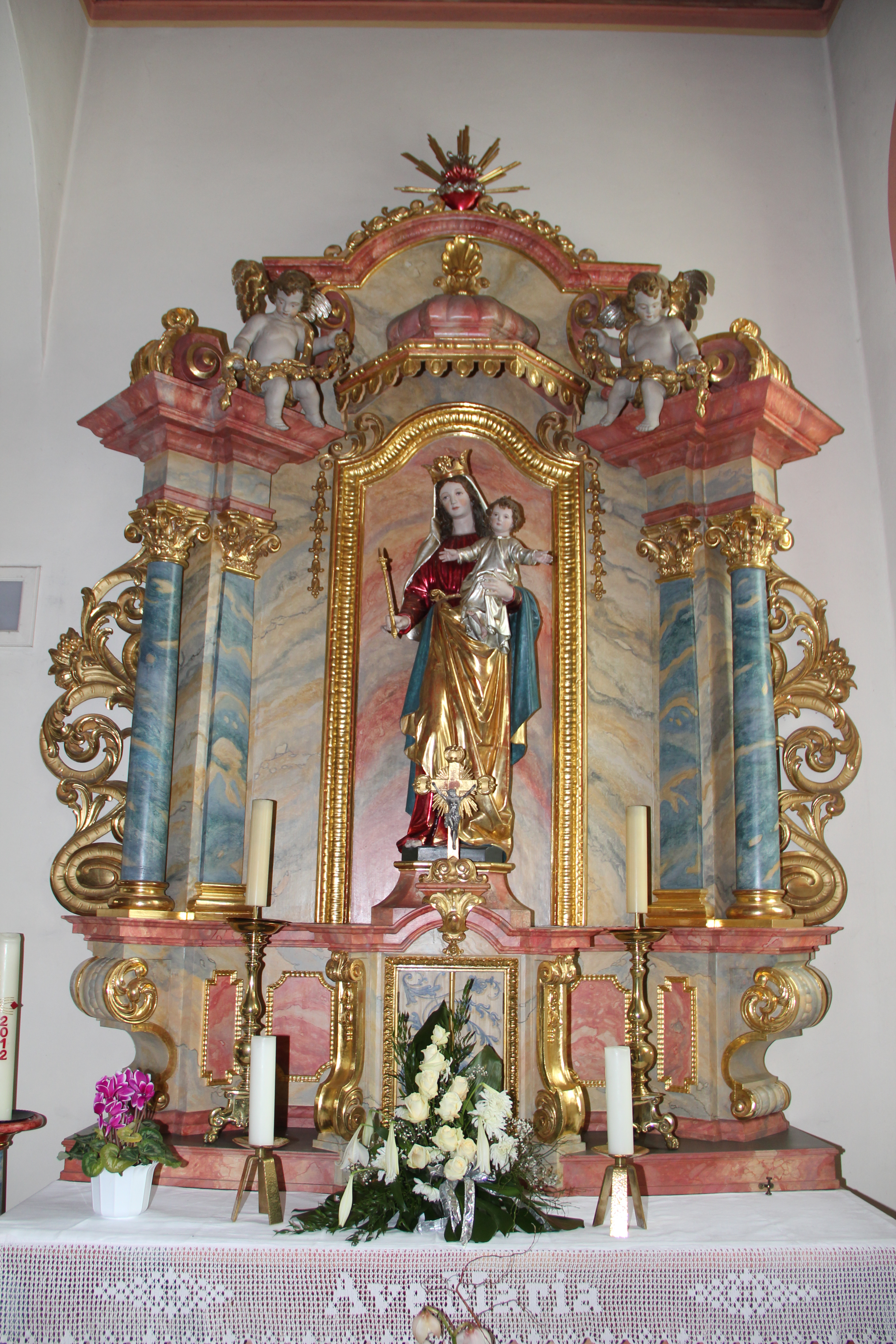 Seitenaltar in der Sankt-Martin-Kirche in Mackenrode